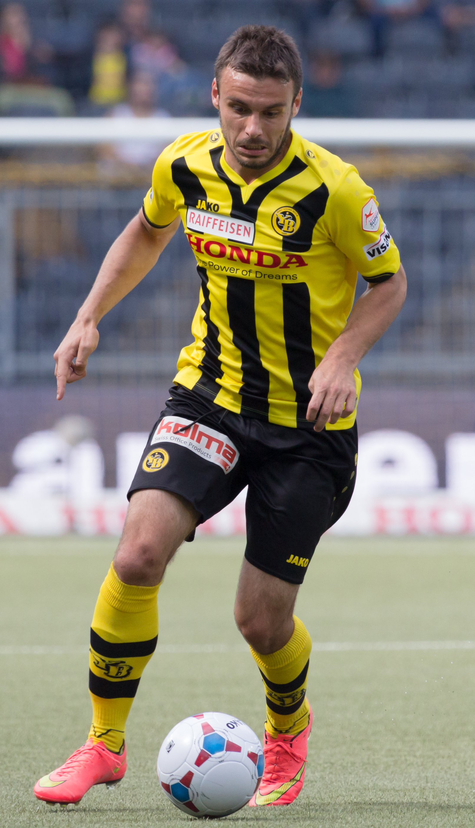 Milan Gajić und Thierry Doubaï beim Spiel des BSC Young Boys gegen den FC Luzern